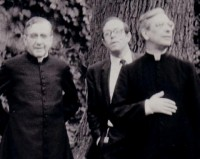 Carlos Llano y San Josemaria Escriba de Balaguer y Alvaro del Portillo